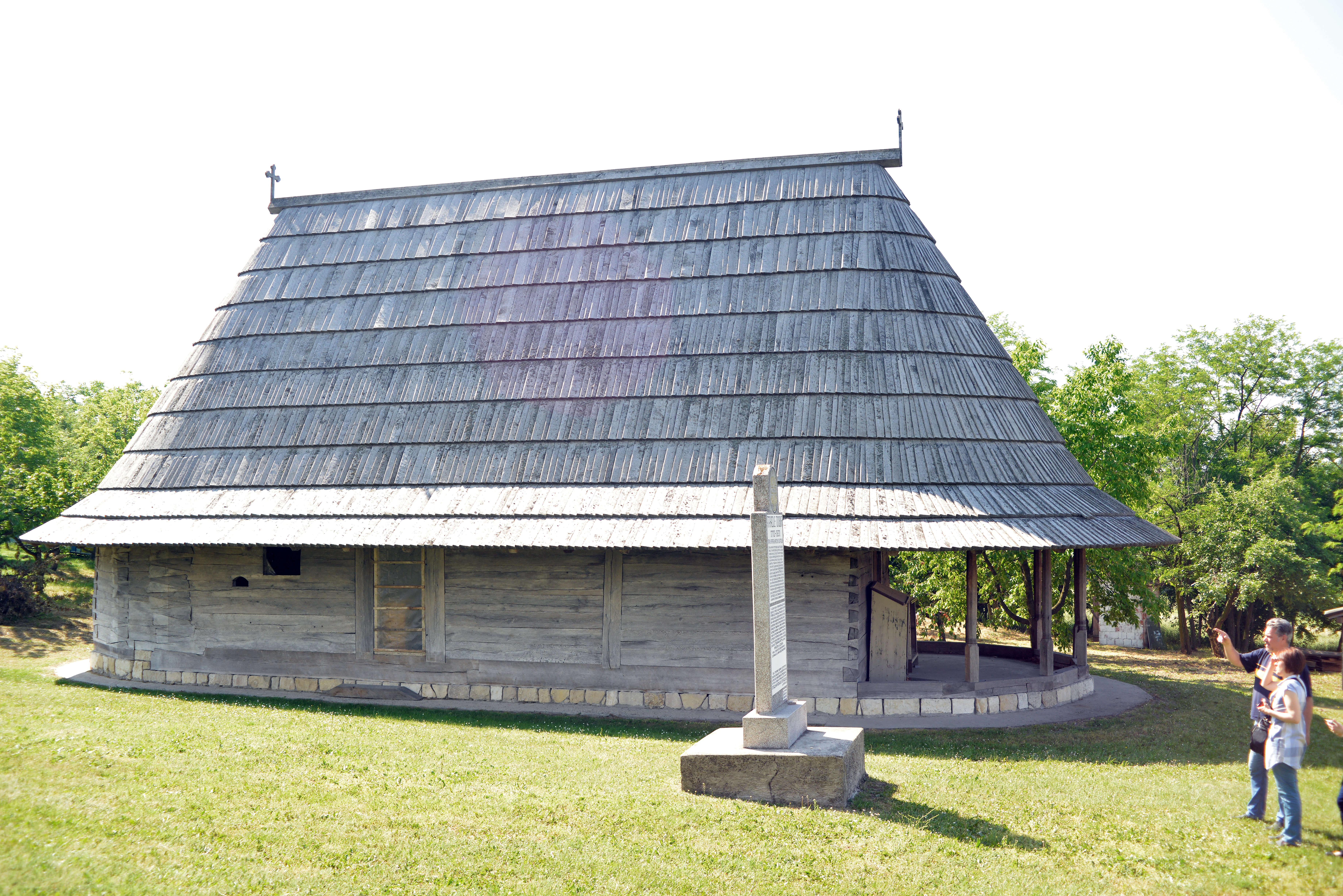 Poseta crkvi brvnari u porti Crkve sv. Ilije u Vraniću tokom projekta "Beogradski bibliotekari o Beogradu"